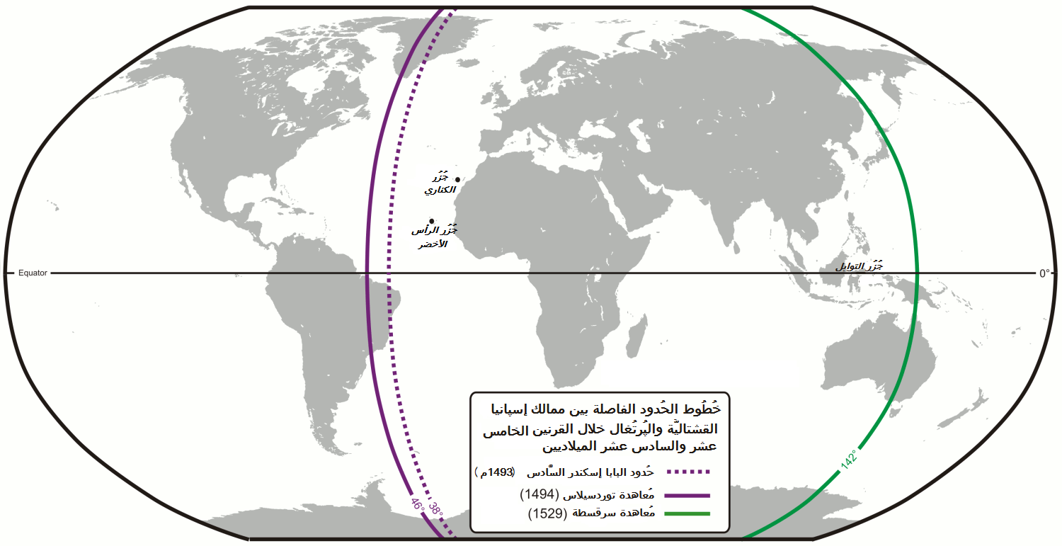 الحُدود التي أُقيمت بين إمبراطوريتيّ إسپانيا والپُرتُغال الاستعماريتين خِلال القرنين الخامس عشر والسادس عشر الميلاديين.